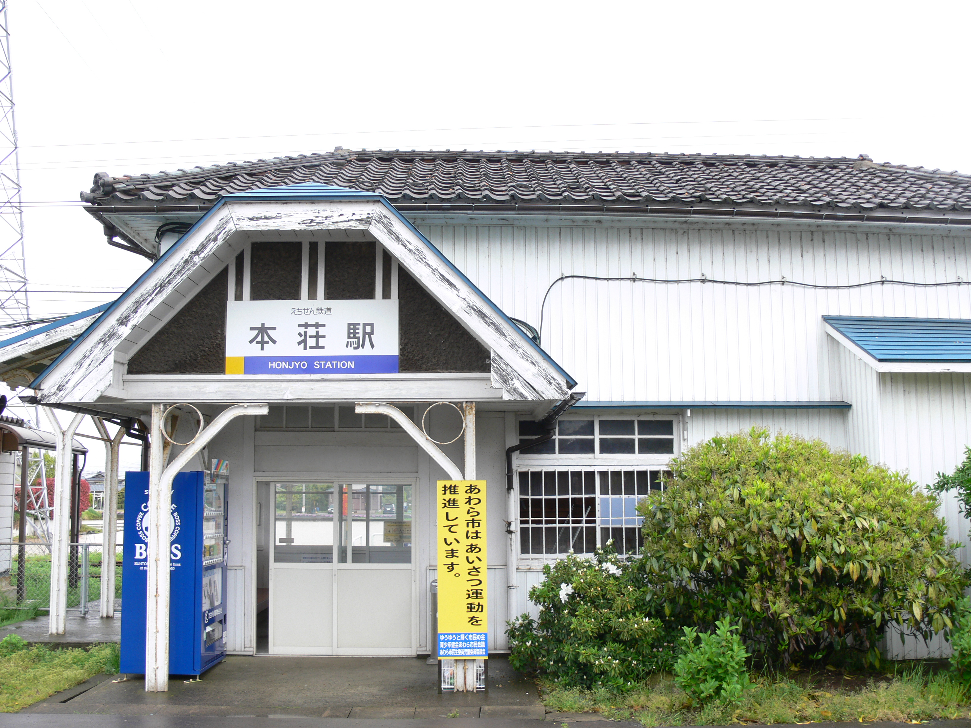 Honjo Station